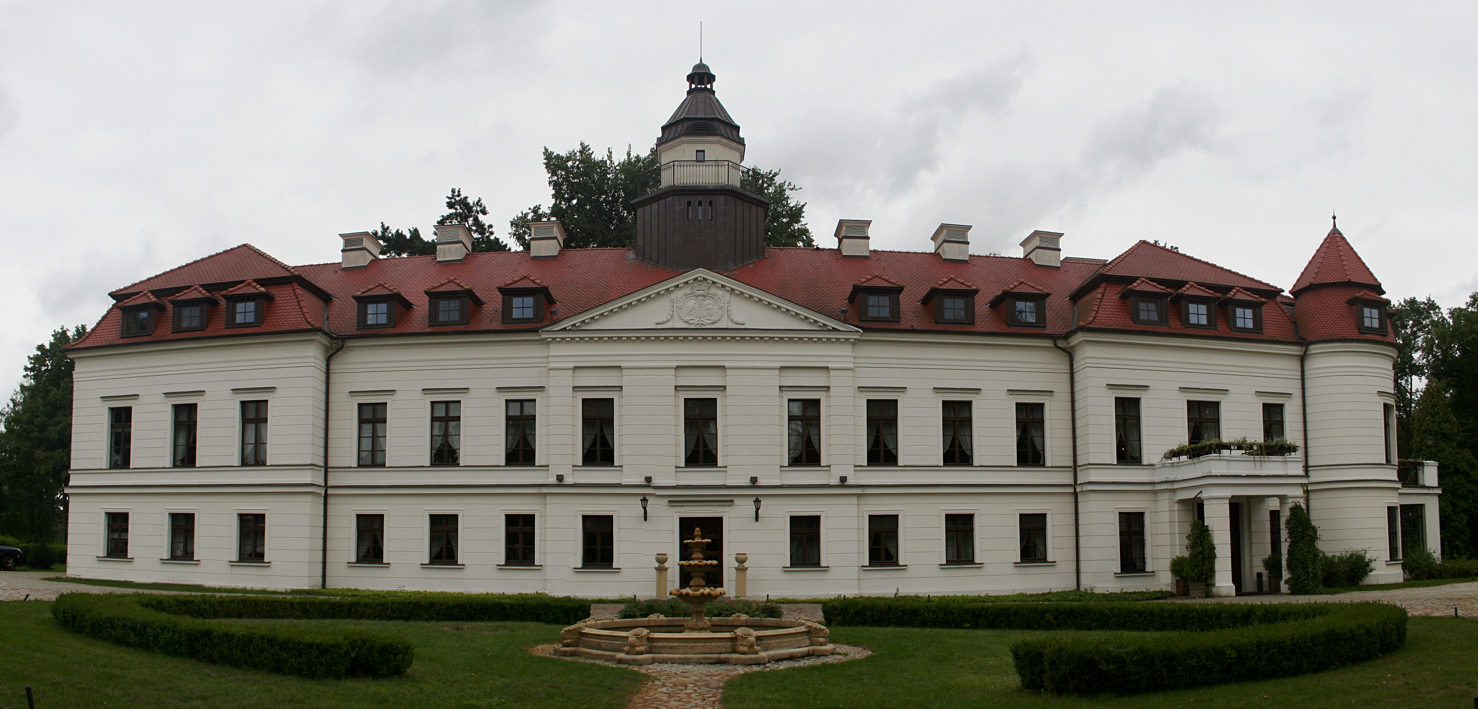 Wiejce. Pałac, 2 poł. XIX.